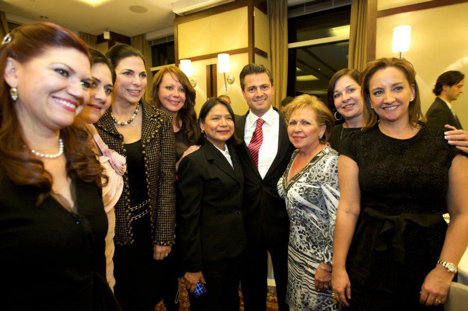 lic. sofia castro ríos con el presidente de la república Enrique Peña Nieto